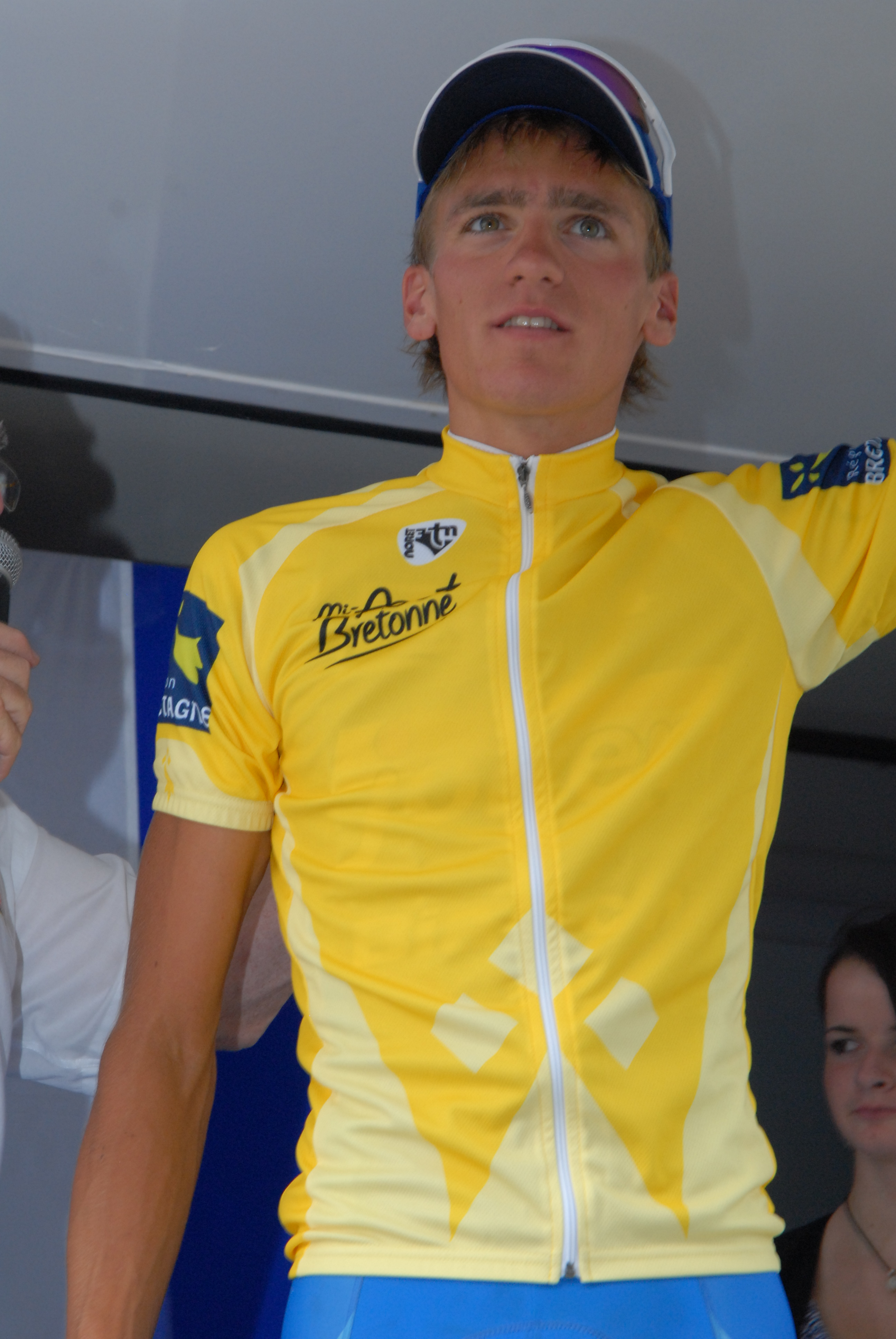 Victoire de Frederick Willmann à la Mi-Août en Bretagne